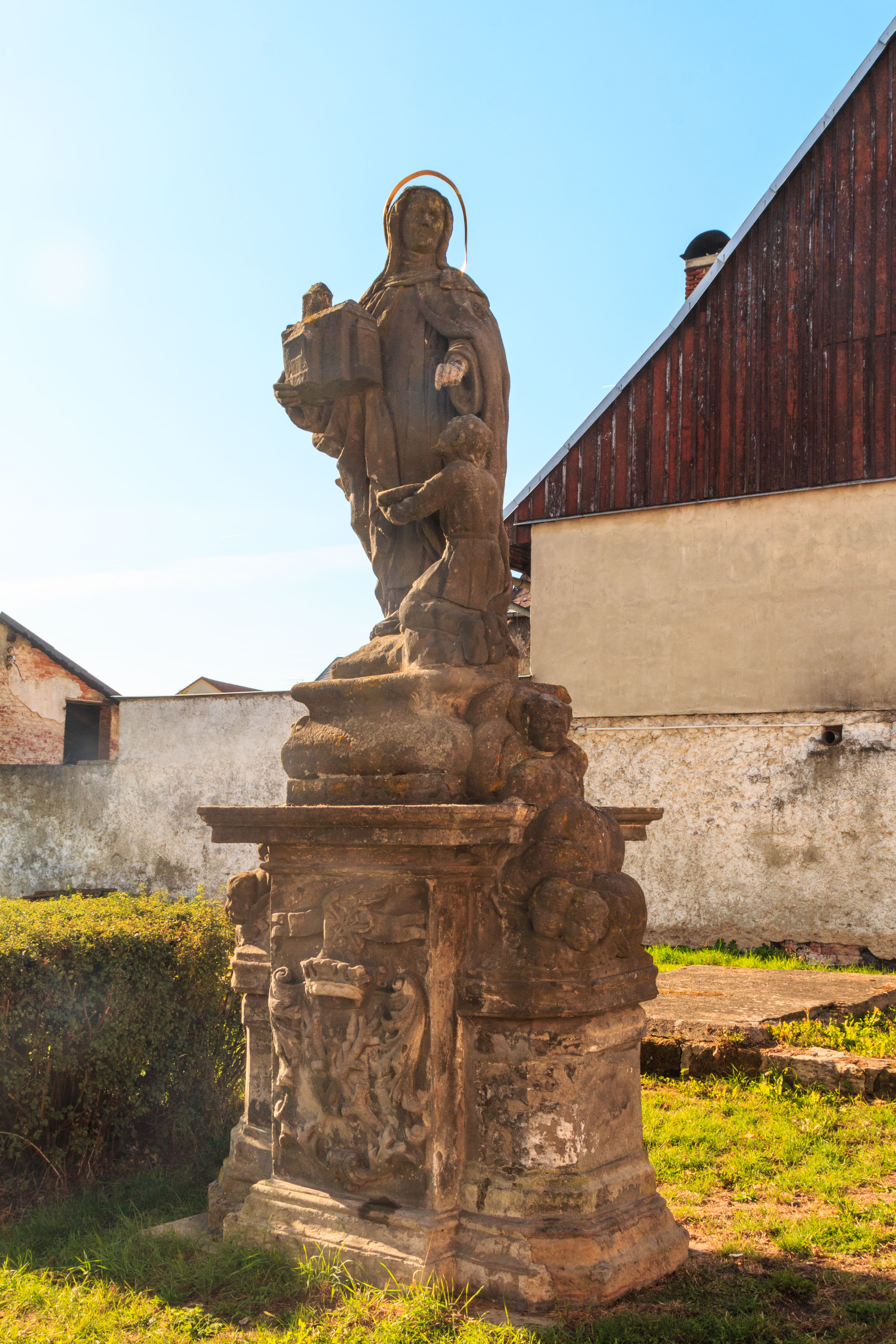 Sochy svatého Jana Nepomuckého a svaté Zdislavy, Dominikánské náměstí, pp. 1262/3, Jablonné v Podještědí. Project: Vodstvo.